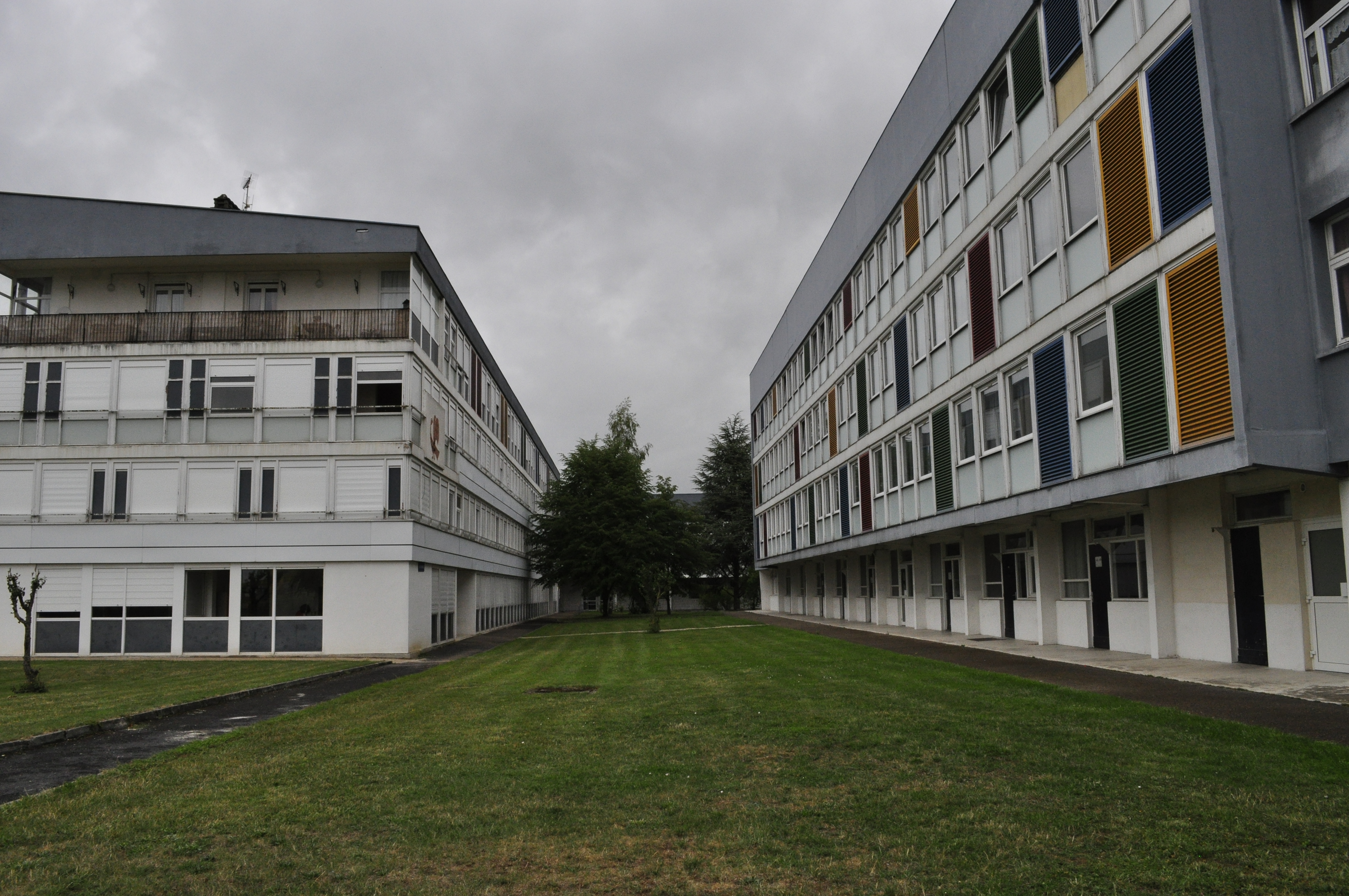 Cité scolaire François Ier (Vitry-le-François, 51300) : bâtiments Unesco et De Moivre.